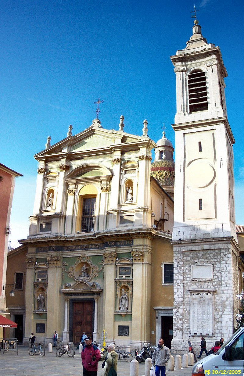 Vue panoramique de la cathedrale Sainte-Reparate à Nice (F06)